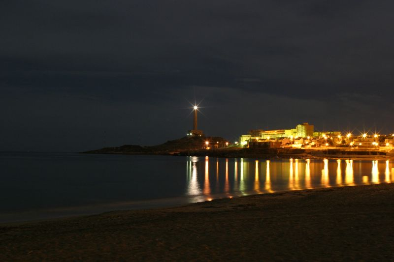 Faro de Cabo Palos